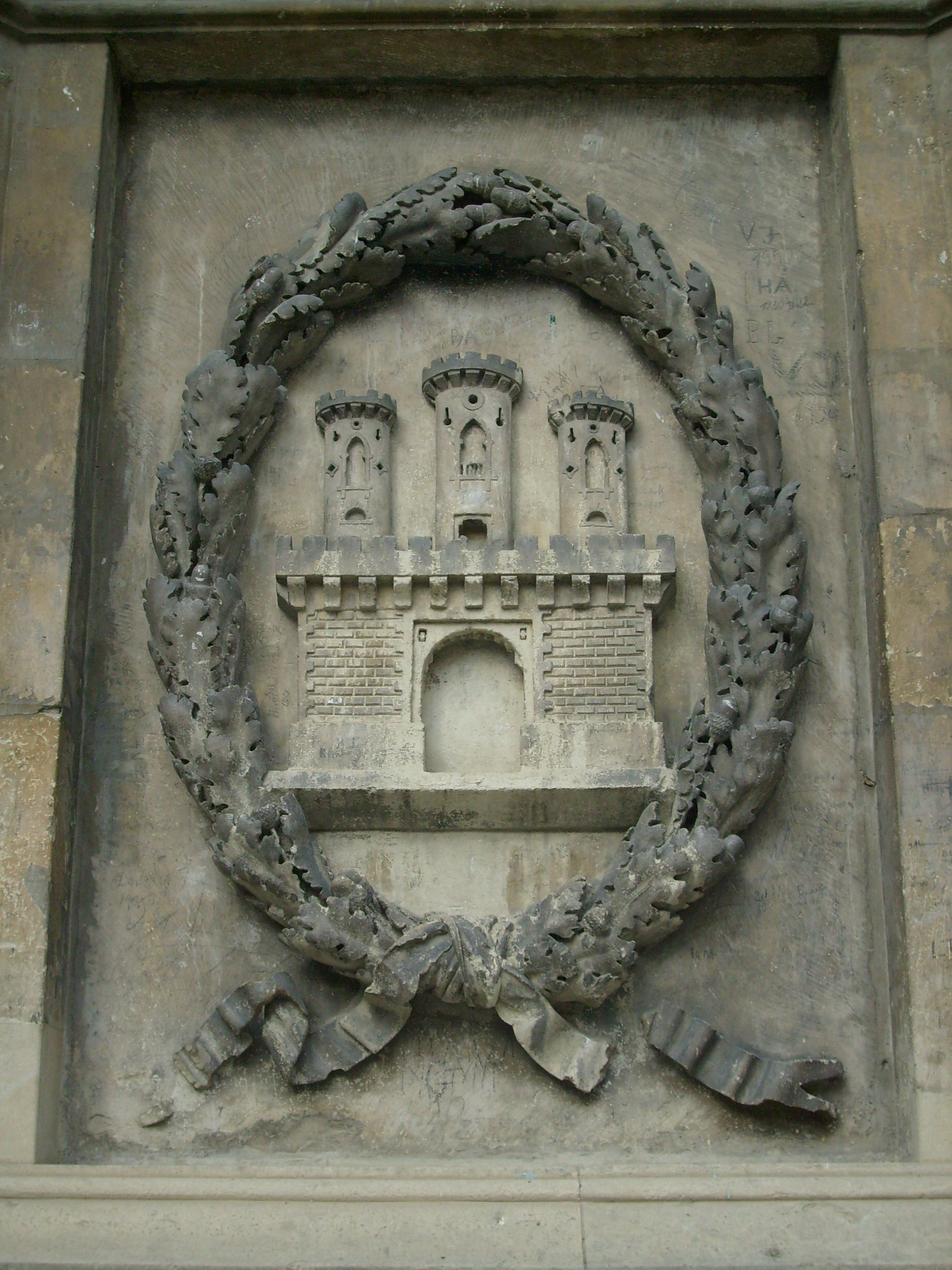 Cluj-Napoca, Obeliscul Carolina (basorelief: stema oraşului Cluj în secolul al XIX-lea).